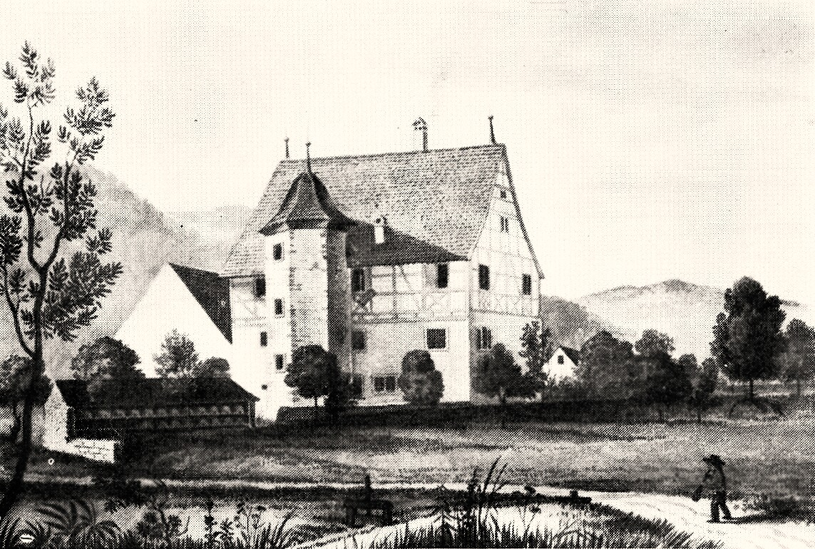 Schlossgut Ehner-Fahrnau in Schopfheim